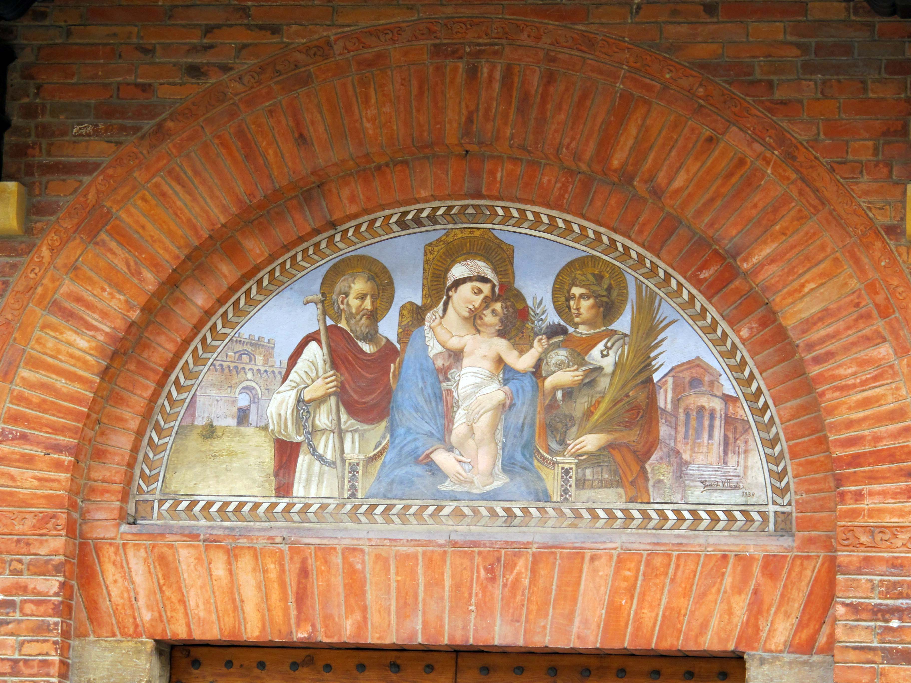 Siena